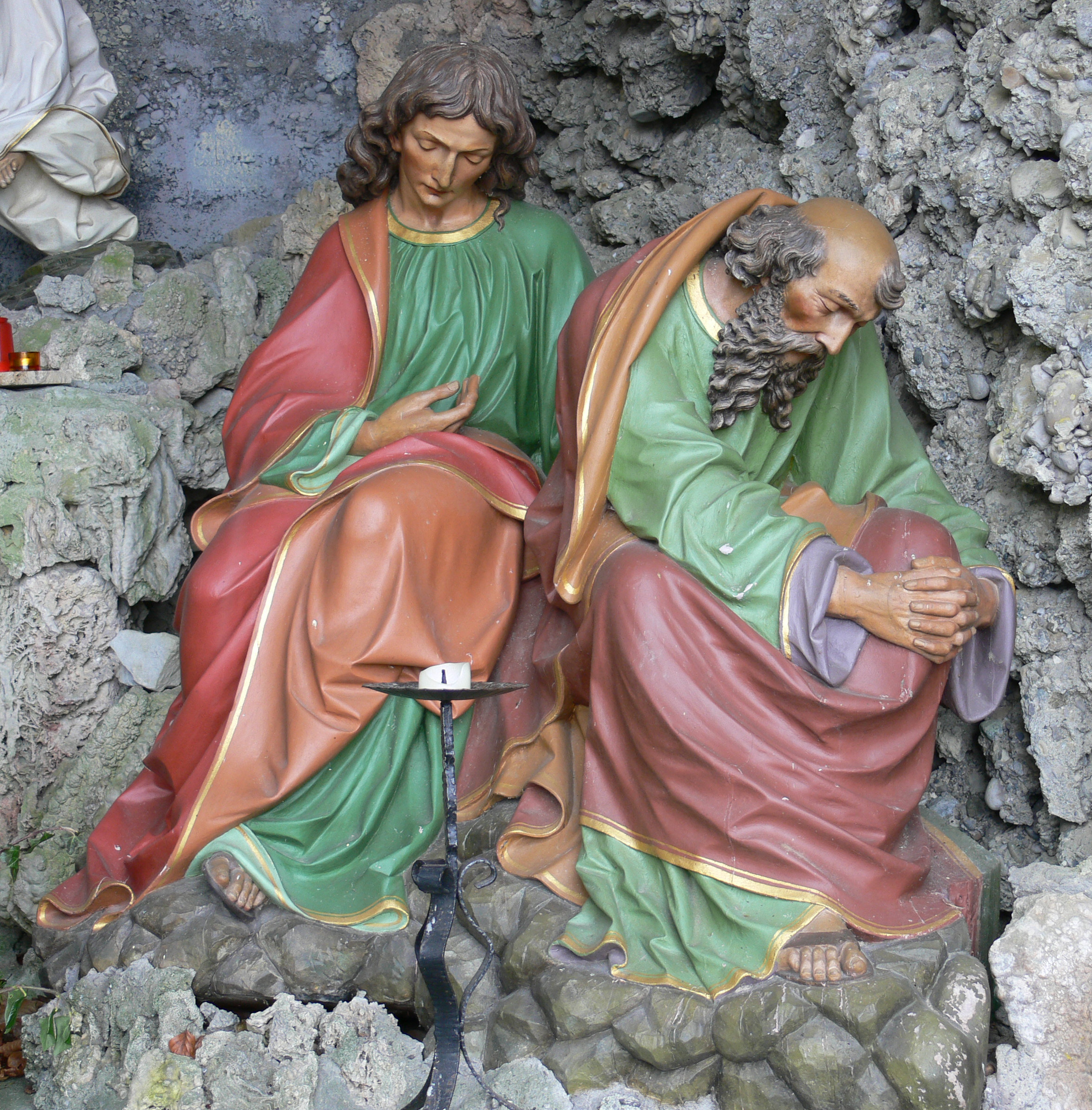 Horgenzell, Andachtsstätte „Föhrenbühl“ in Wolketsweiler: Ölberg Skulpturen von Moriz Schlachter